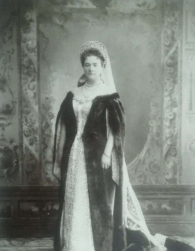 Княгиня Александра Владимировна Трубецкая (1861—1939), урожденная Оболенская